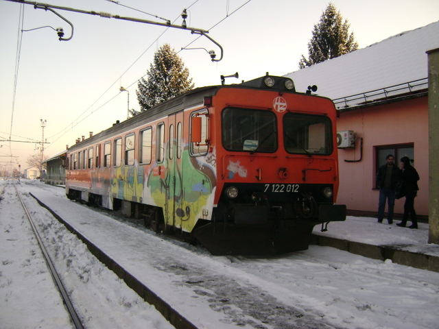 HŽ serija 7122 na kolodvoru Ogulin